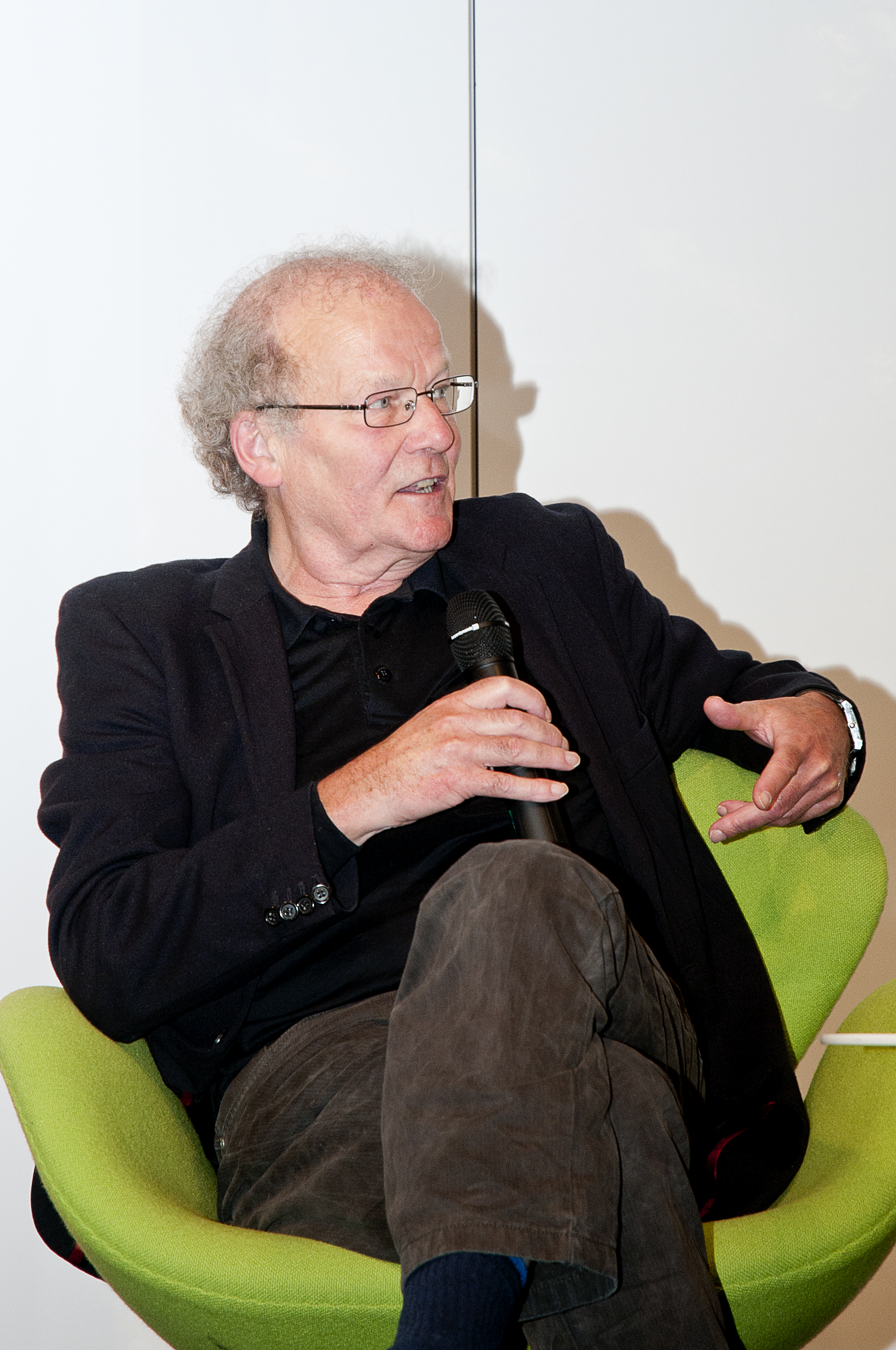 Joscha Schmierer (Publizist) Foto: Isis Martins